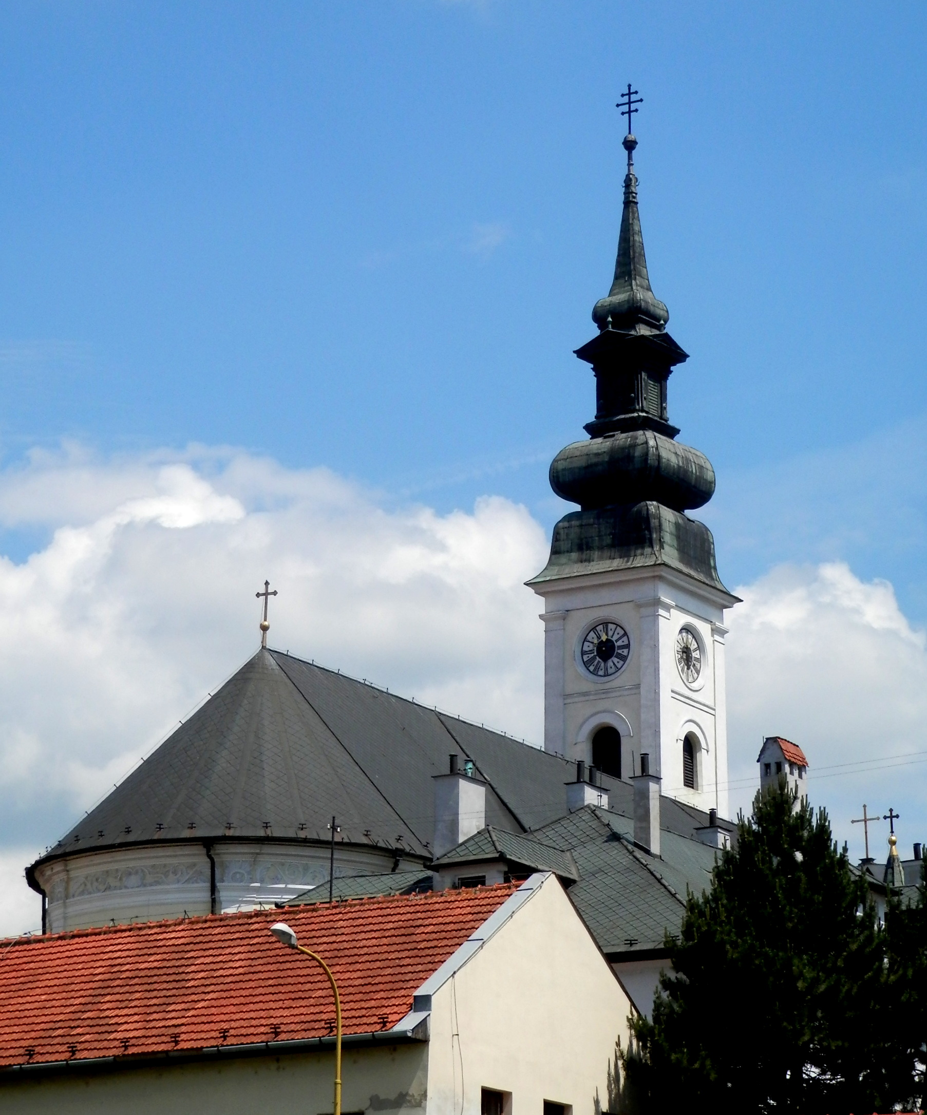 Veža katedrály svätého Jána Krstiteľa. Mesto Prešov.